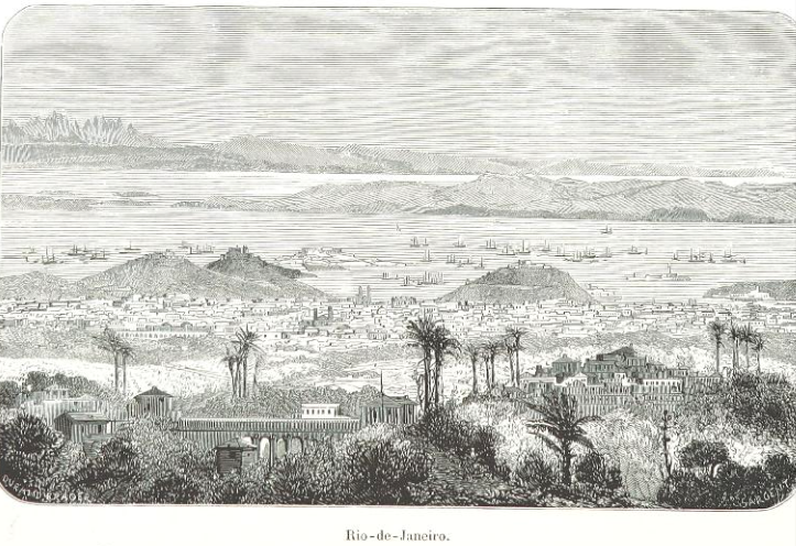 Arthur Mangin, Voyages et Découvertes outre-mer au XIXe siècle, illustrations par Durand-Brager, 1863. Capitaine Louis de Freycinet, Rio de Janeiro (6 décembre 1817).